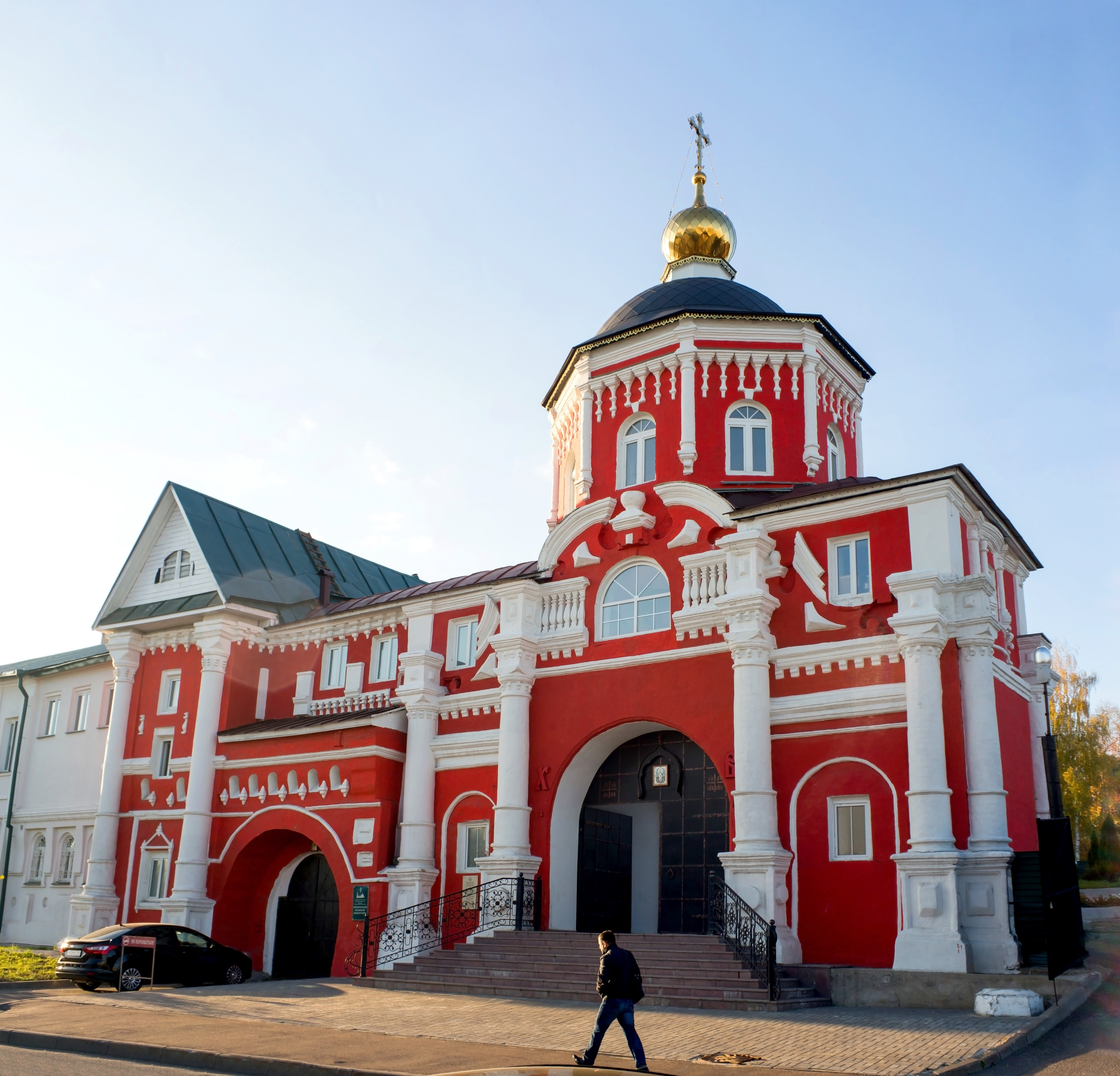 Монастырь Кизический (Республика Татарстан, Казань, Декабристов улица, 98)